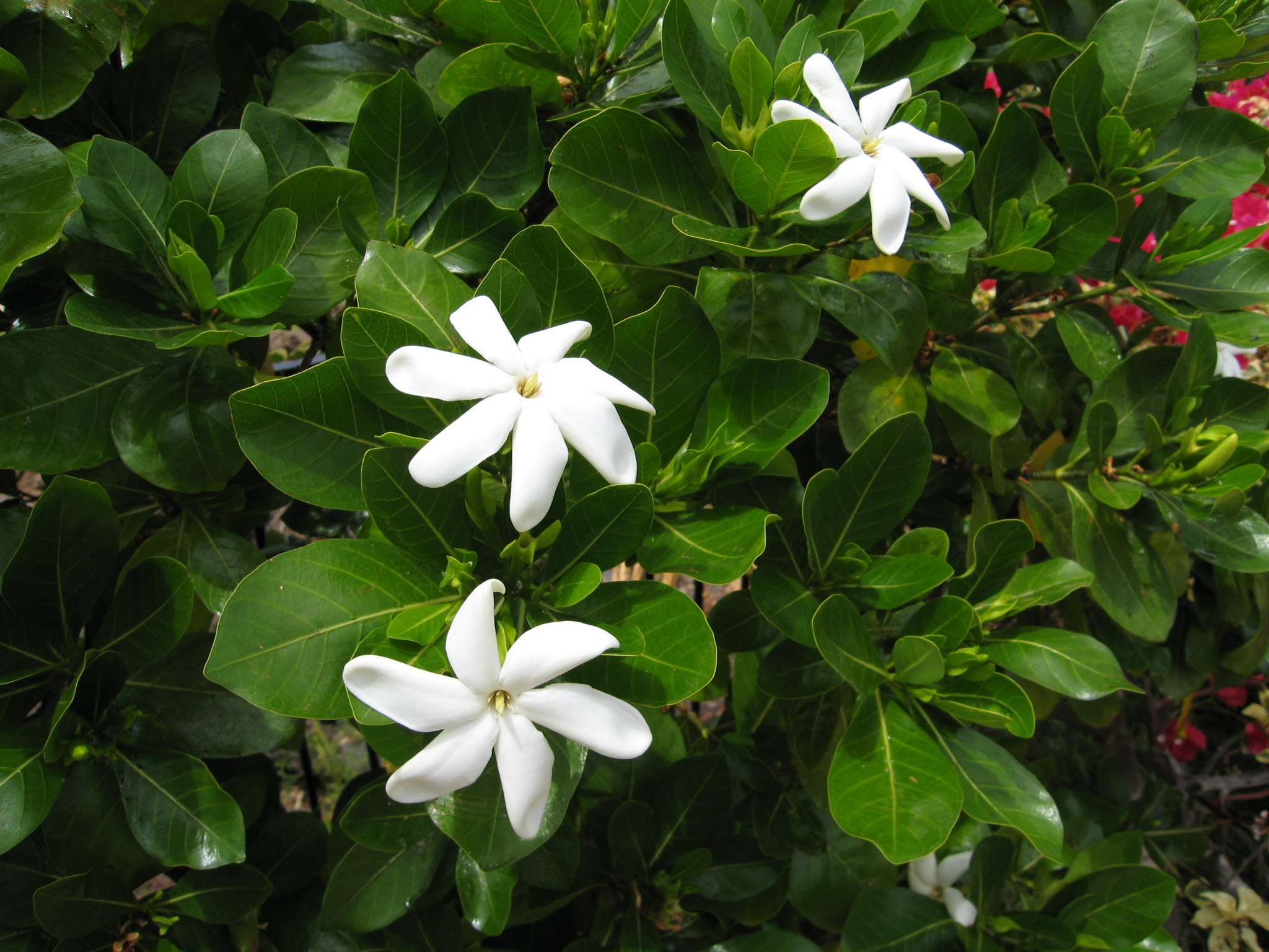 Tahitian Gardenia - tiare